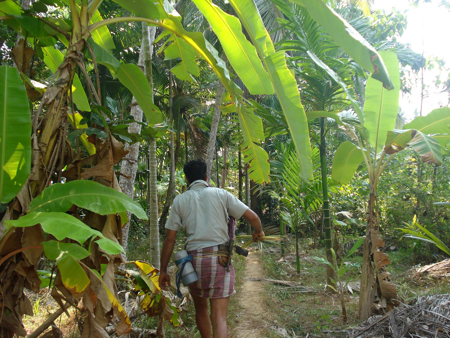 ചെത്തുകാരൻ ചെത്ത് തൊഴിലാളി തെങ്ങിൽ കയറി ചെത്താൻ പോകുന്നു. വടക്കൻ കേരളത്തിൽ ചെത്ത് തൊഴിലാളിയെ ‘ഏറ്റുകാരൻ’ എന്ന് പറയുന്നു. തെങ്ങിൽ കയറിയിട്ട് വിടരാത്ത തെങ്ങിൻ പൂക്കുല മുറിക്കുമ്പോൾ ഒഴുകിവരുന്ന ദ്രാവകത്തിൽനിന്ന് നാടൻ പാനീയമായ കള്ള് നിർമ്മിക്കുന്നു.